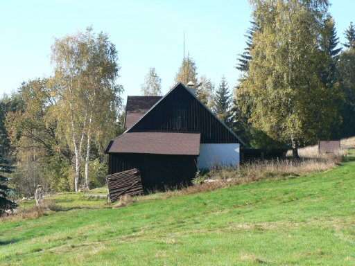 Oldřichov (součást města Nejdek, okres Karlovy Vary) v současnosti